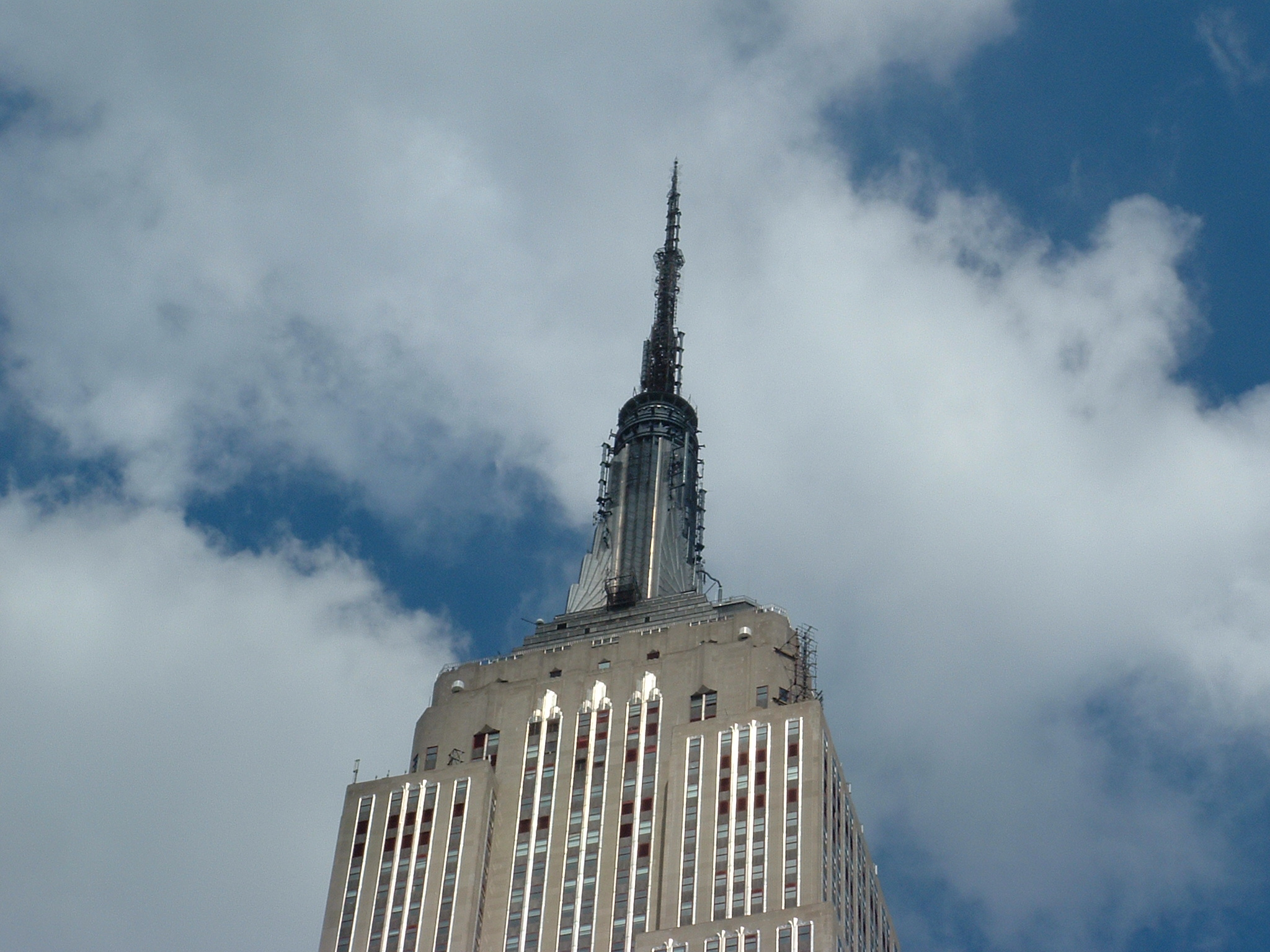 Mast van Empire State Building.